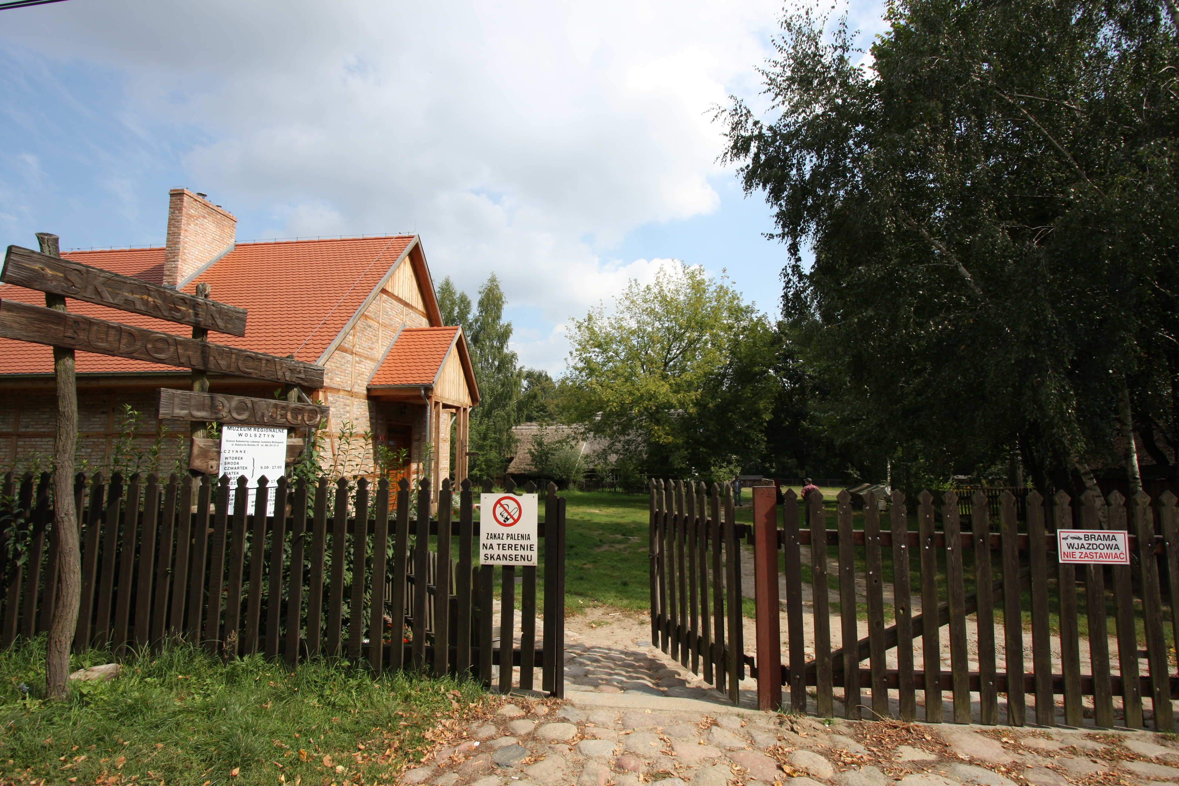 Wolsztyn, skansen budownictwa ludowego, ul. Bohaterów Bienika 26